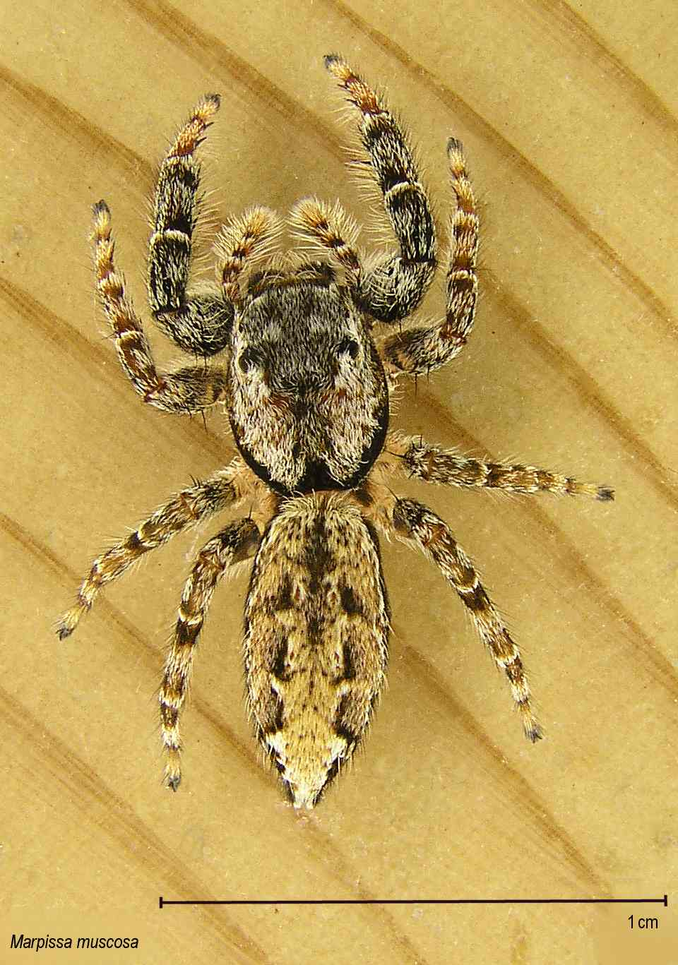 Marpissa muscosa gevangen te Kampen, NL, op zijkant van vogelnestkast 14/5/2005. Leg, det en Foto E. van Herk.